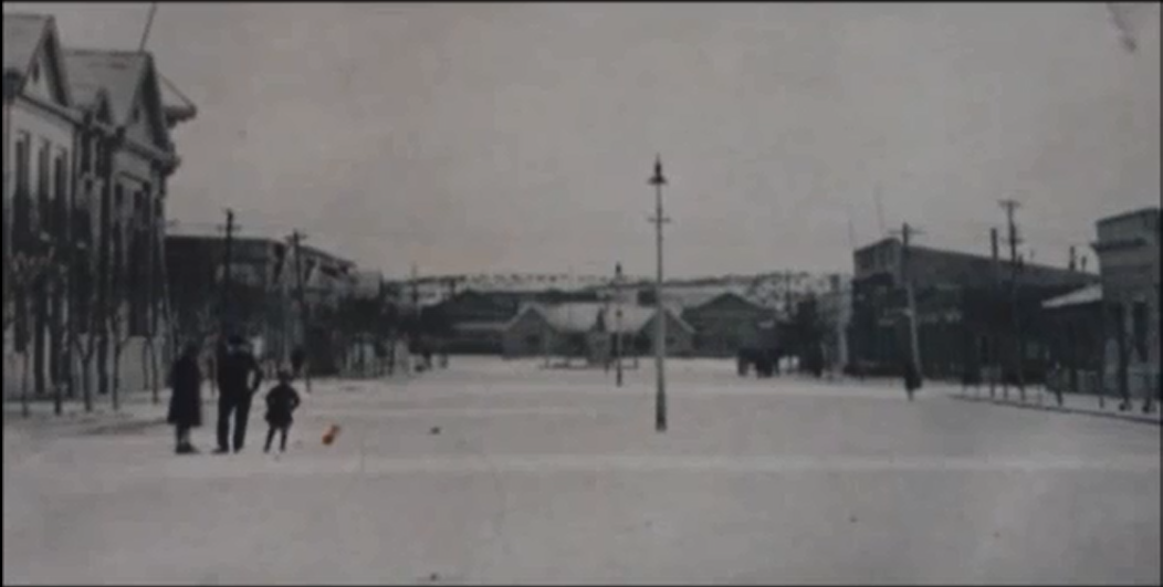 Avda Fontana, Trelew, hacia principios del siglo XX